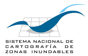 Logo del Sistema Nacional de Cartografía de Zonas Inundables del Gobierno de España.